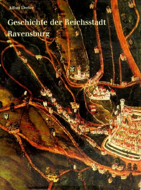 Buchumschlag zu Alfons Dreher: Geschichte der Reichsstadt Ravensburg, Bd. 2, 1972